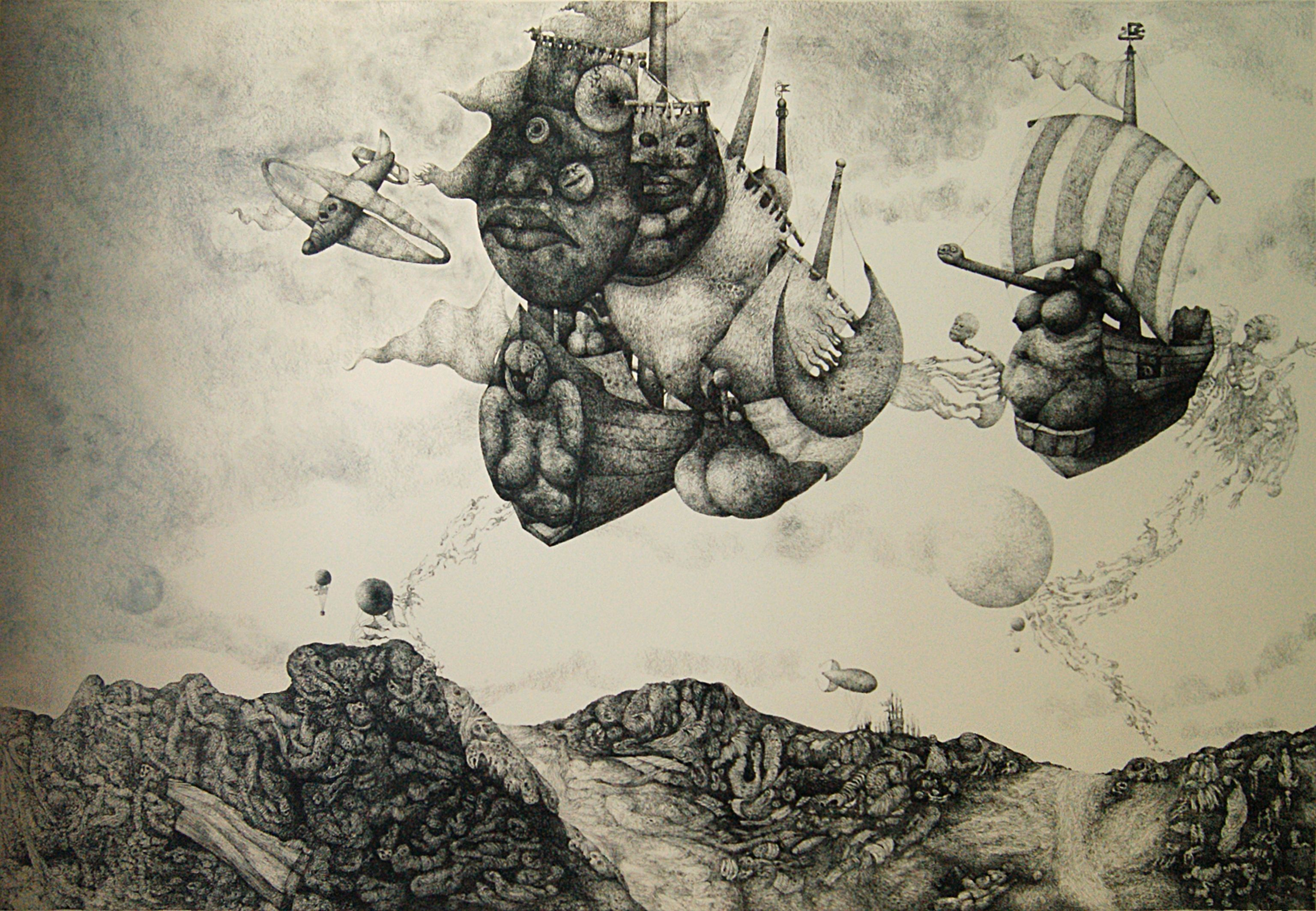 Ahasvers Flugtitle QS:P1476,de:"Ahasvers Flug" label QS:Lde,"Ahasvers Flug"